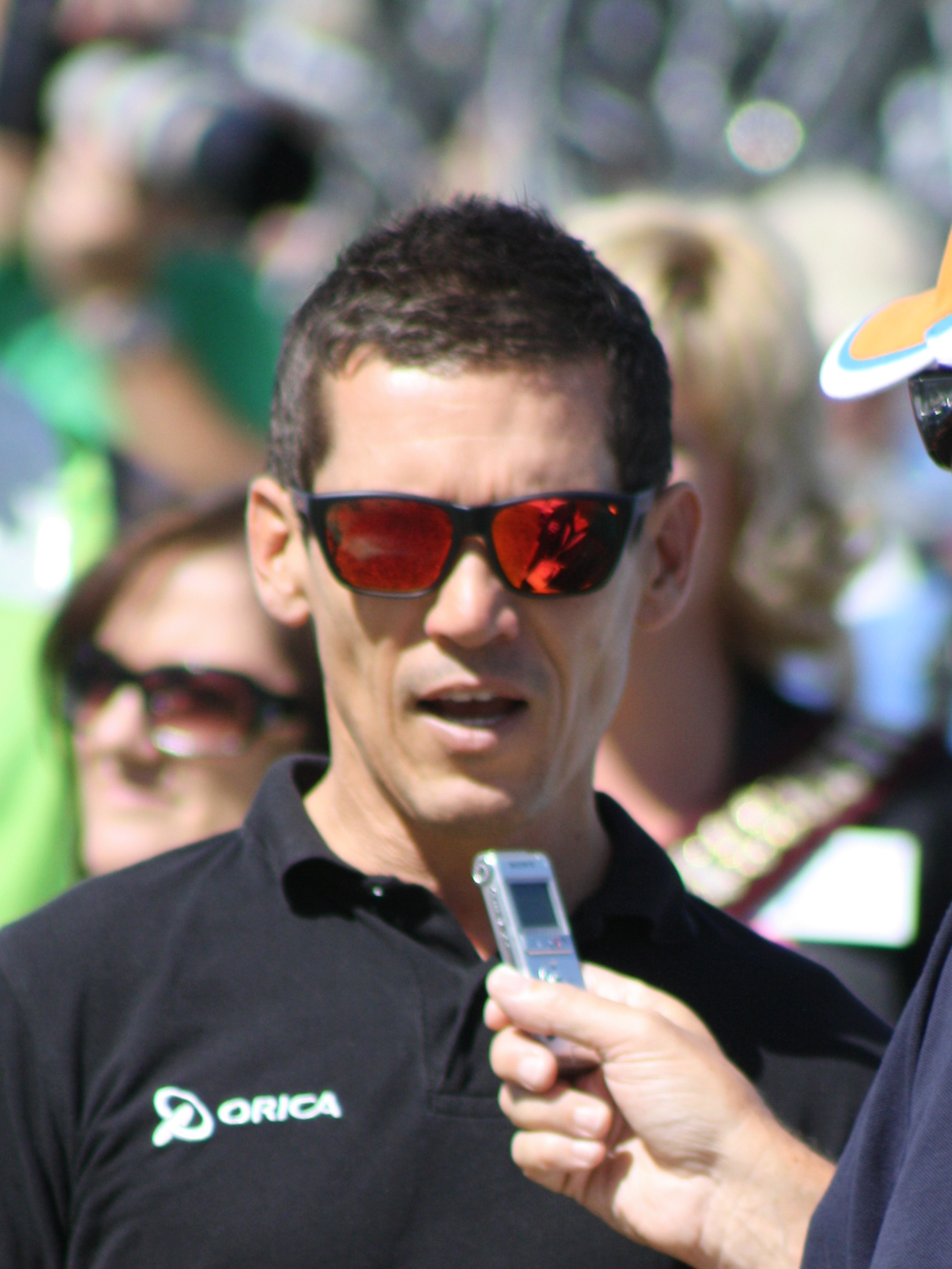 Robbie